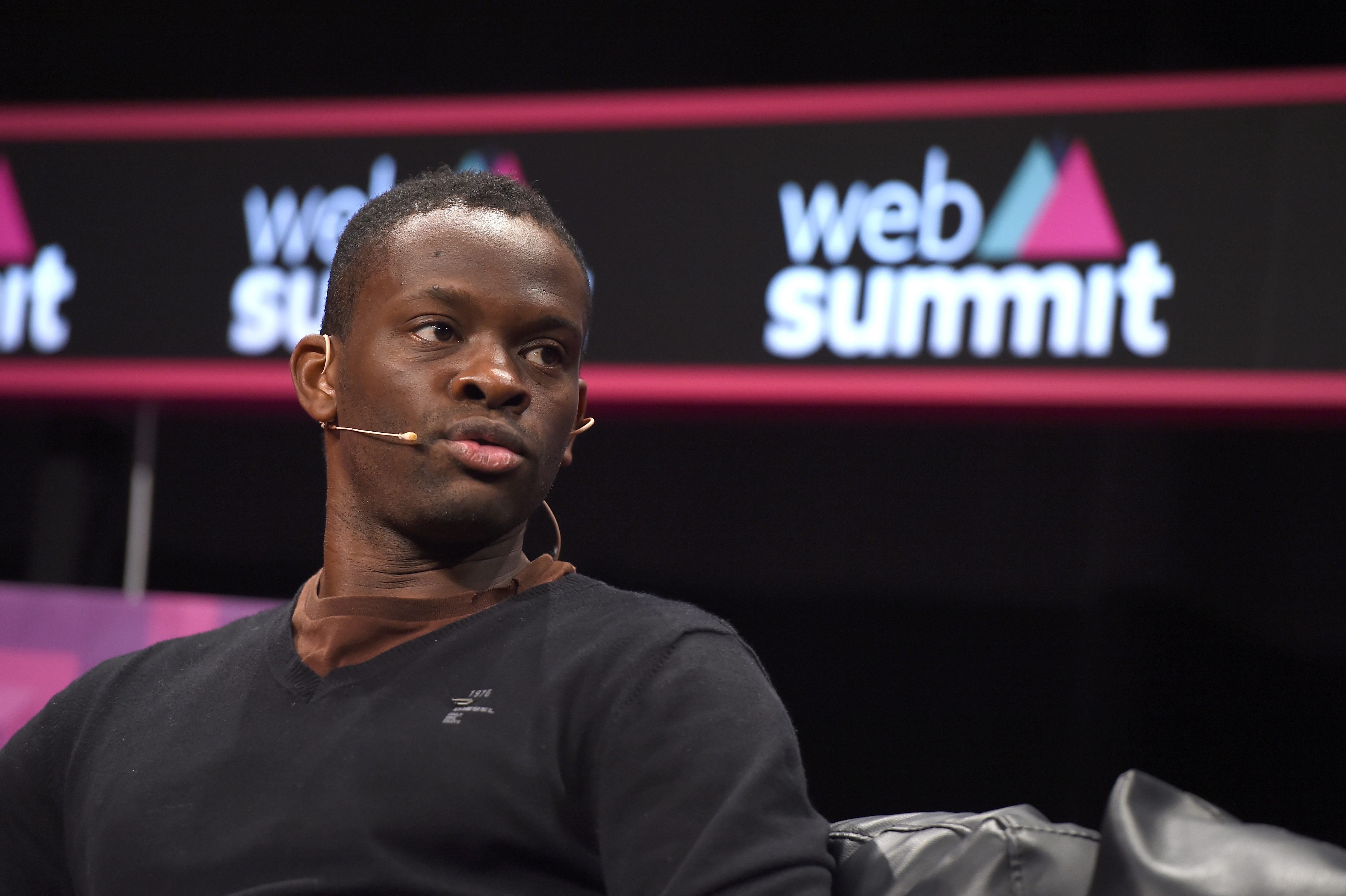 Sportsfile (Web Summit)